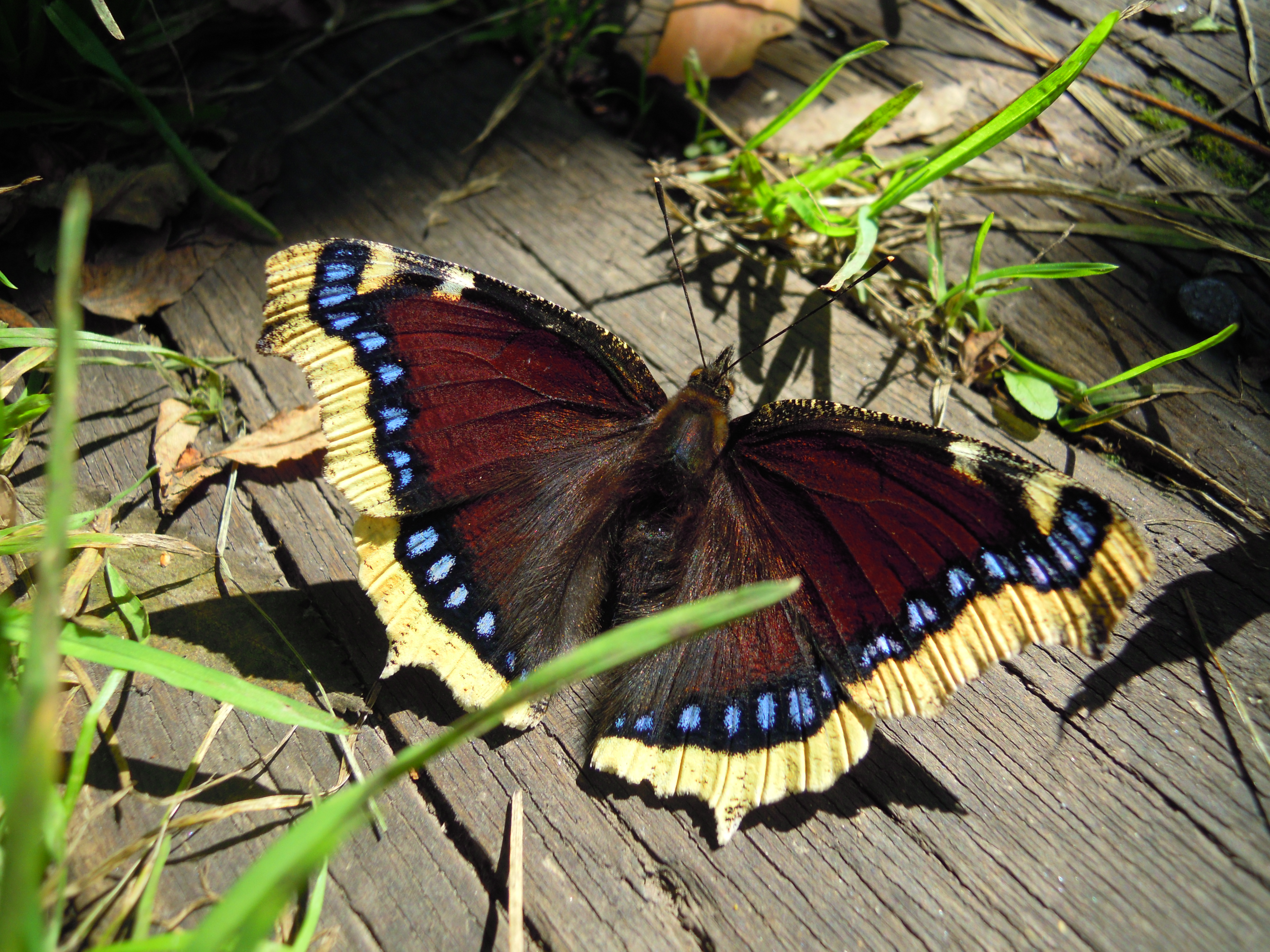 нимфа антиопа